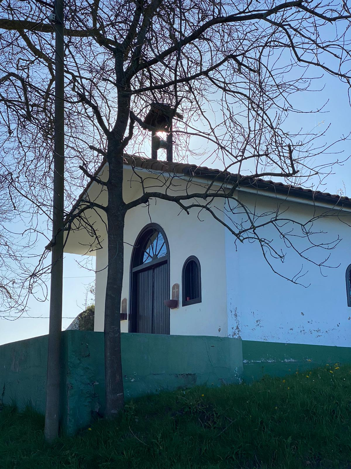 Muino txiki batean eraikita dago.